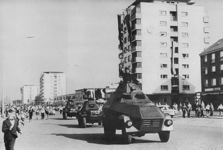 Eisenhüttenstadt, 12. Jahrestag DDR-Gründung, Parade Zentralbild Peukert 10.10.1961 Tag der Republik in Eisenhüttenstadt Zu einem Bekenntnis der Verbundenheit der Bevölkerung mit den bewaffneten Kräften unseres Staates wurde der Vorbeimarsch der Angehörigen der Bereitschaftspolizei und der Kampfgruppen (unser Bild) an der Ehrentribüne in [gestrichen: Stalinstadt] am 7. Oktober 1961